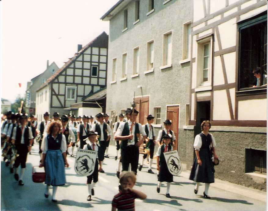 Trachtenkapelle Ebersberg (Oberbayern) [1] in Balve [2] im Sauerland, Nordrhein-Westfalen.